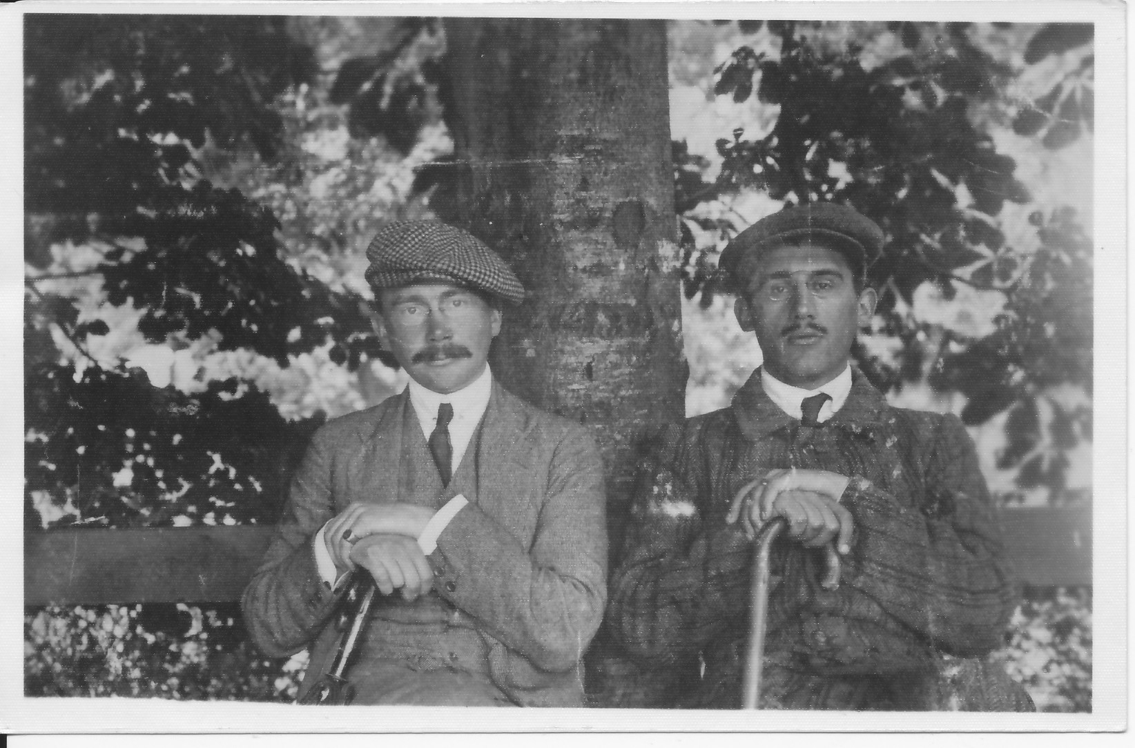 Adam Zurowski i Zygmunt Konopka około 1925